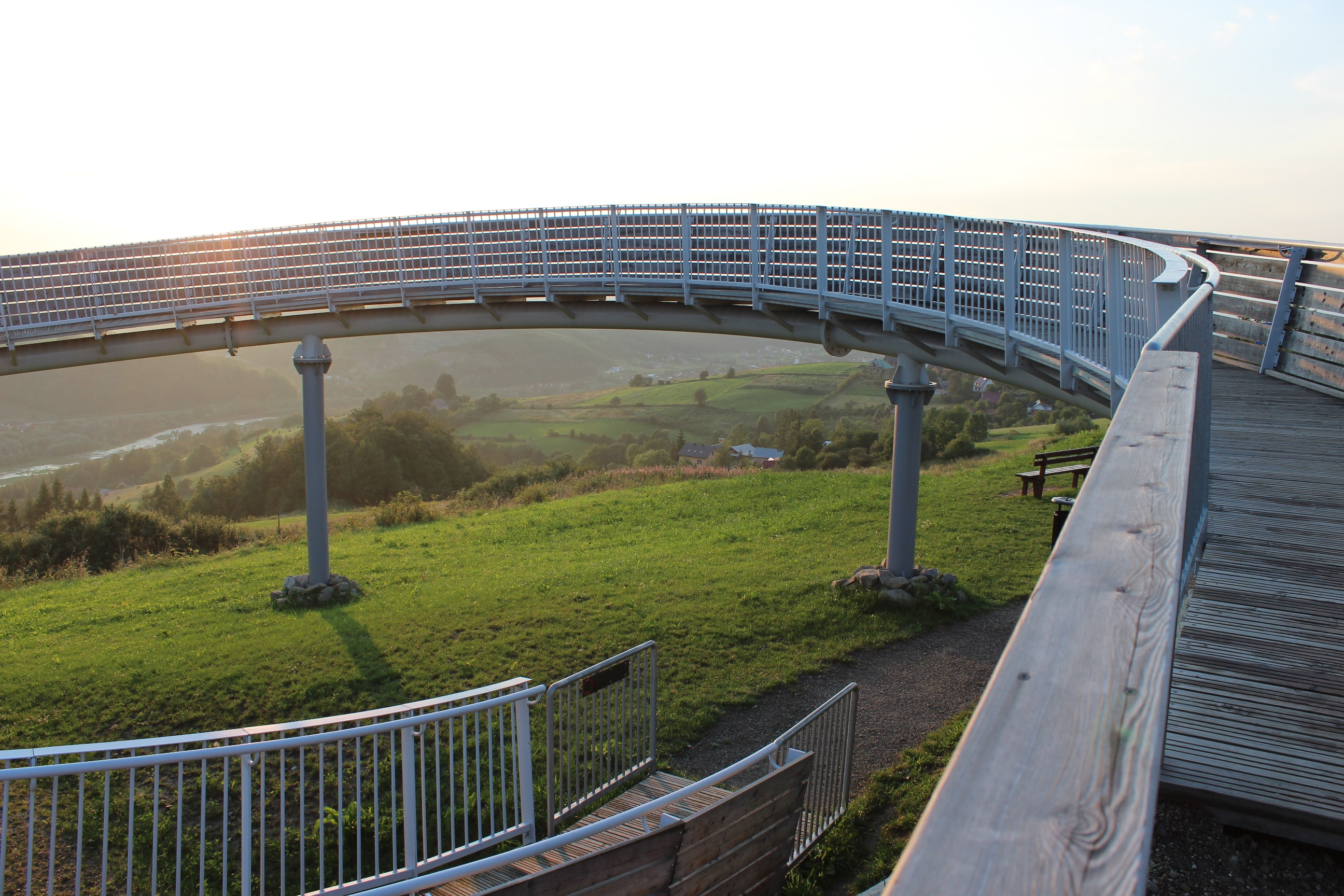 Platforma widokowa Ślimak w Woli Kroguleckiej